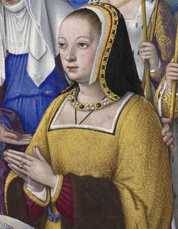 Anna di Bretagna (dettaglio)